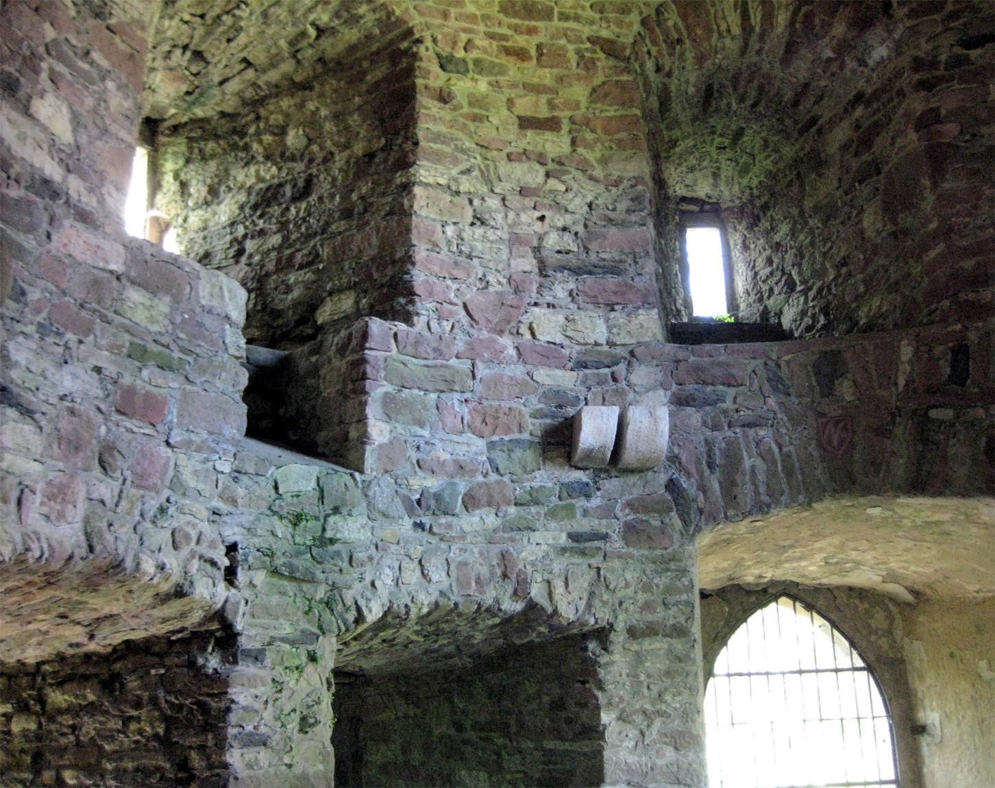 Burg Steckelberg, Rittersaal. An den Wänden Stützen für die ehemalige Holzzwischendecke